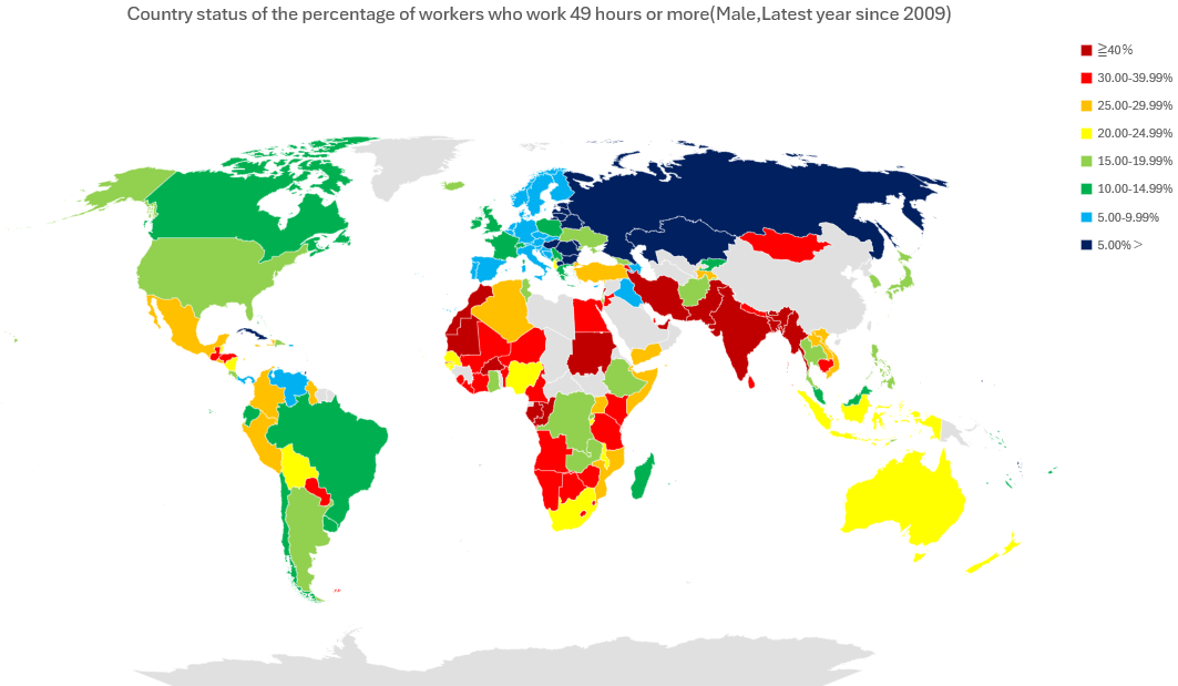 49時間以上男性労働者の割合の国別状況。パートタイムや自営業も含む。